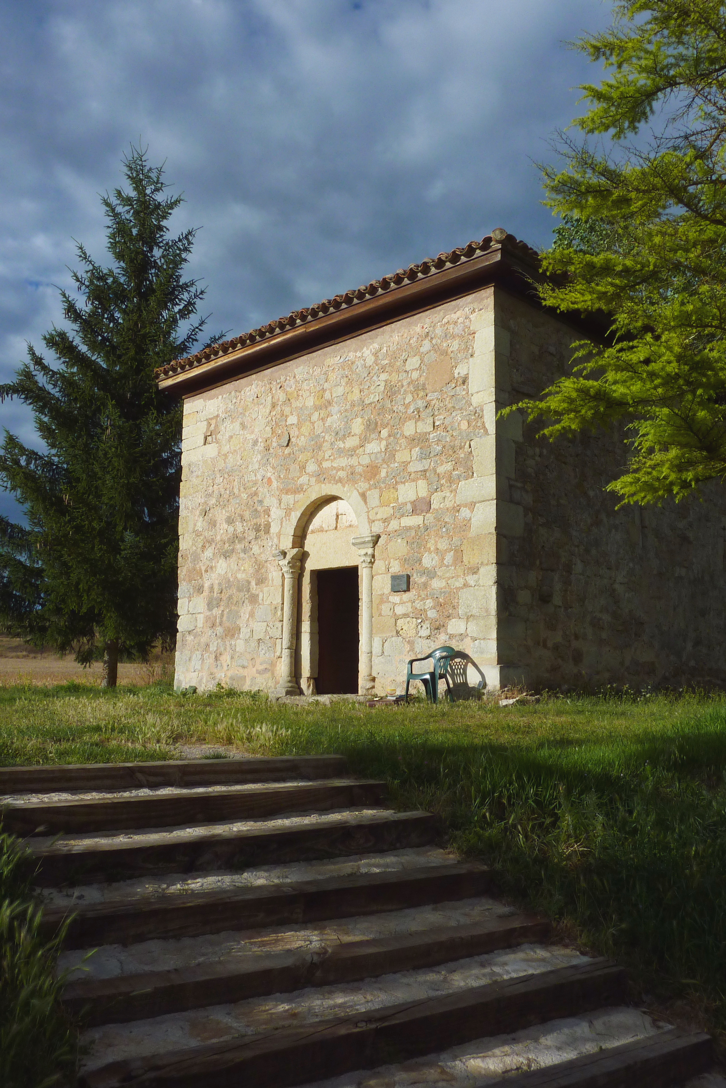 Ermita de San Pelayo in Perazancas de Ojeda, einem Ortsteil von Cervera de Pisuerga in der Provinz Palencia (Kastilien-León/Spanien)